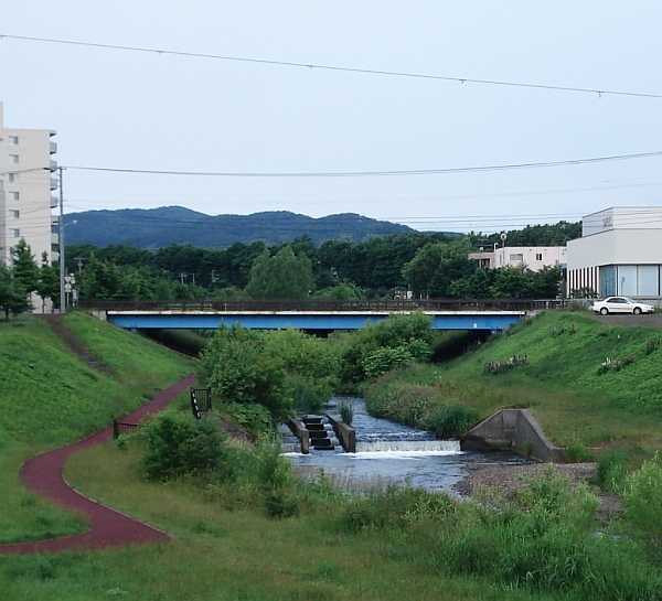 北海道・札幌市南区・清田区・厚別区・白石区・江別市を流れる厚別川。国道36号の清田橋。